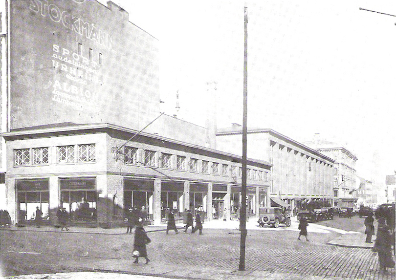 Stockmann tavaratalon väliaikainen myymälärakennus Esplanadin ja Keskuskadun kulmassa